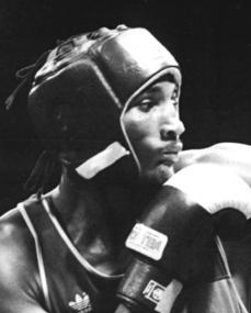 ADN-ZB Oberst 21.9.89 Moskau: Weltmeisterschaften im Boxen-Im Vorrundenkampf der Weltergewichtsklasse kommt es am 21.9.erneut zu einem Duell zwischen Siegfried Mehnert (DDR, r.) gegen Juan Carlos Lemus (Kuba). Beim Finale des Berliner TSC-Turniers 1989 (Foto) blieb der mehrfache DDR-Meister, Europameister 1985 und 1989 und Weltcupsieger 1987 (SC Chemie Halle), Punktsieger über den kubanischen Landesmeister 1988 und Vizemeister 1986, 1987 und 1989.